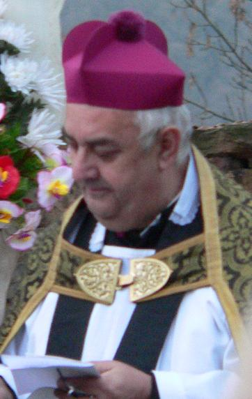 Mons. Vladimír Gajdušek